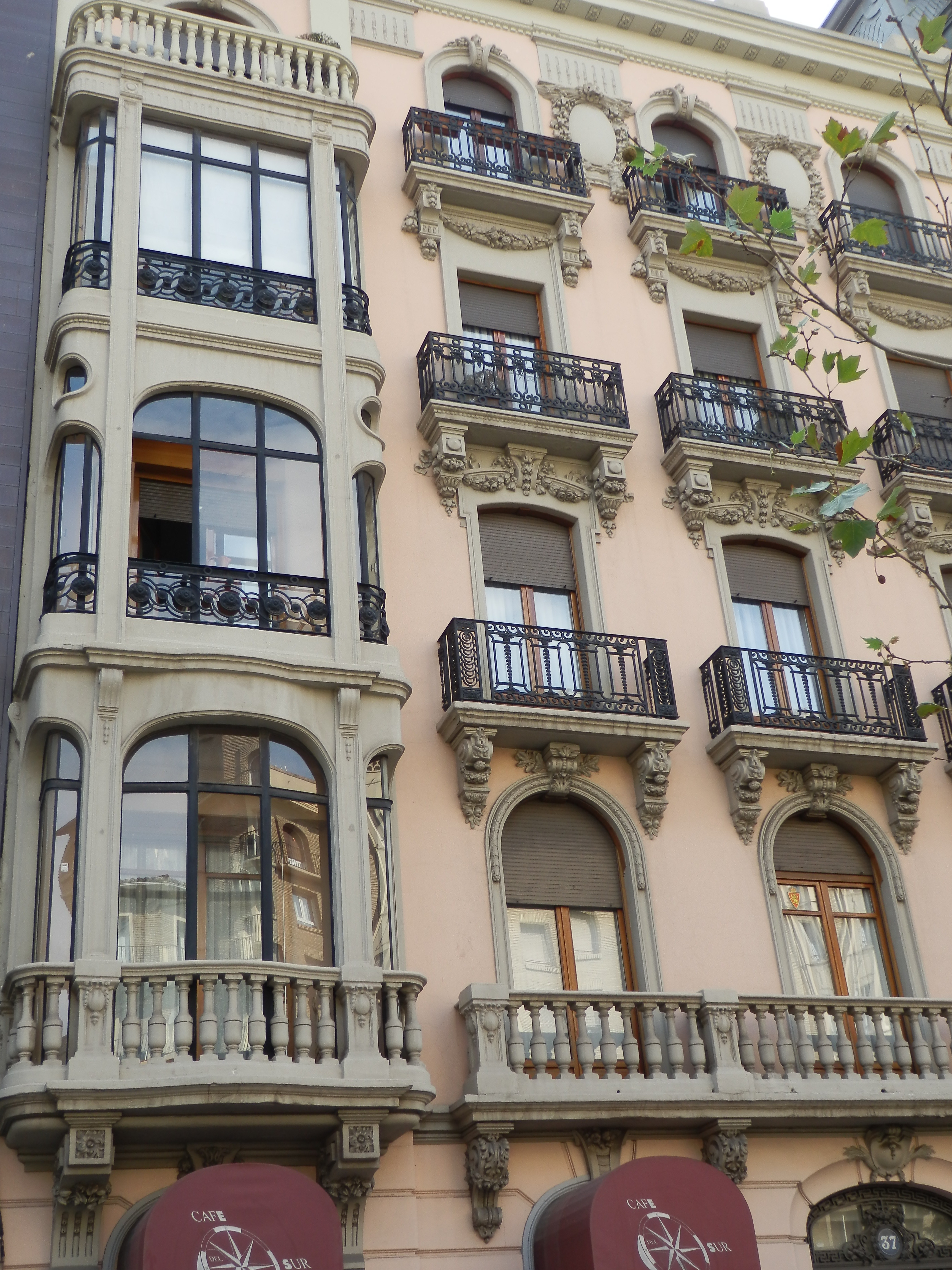 Edificio de viviendas en el Paseo de Sagasta, 37, de Zaragoza, España. Es bien de interés cultural (BIC) de la provincia de Zaragoza.